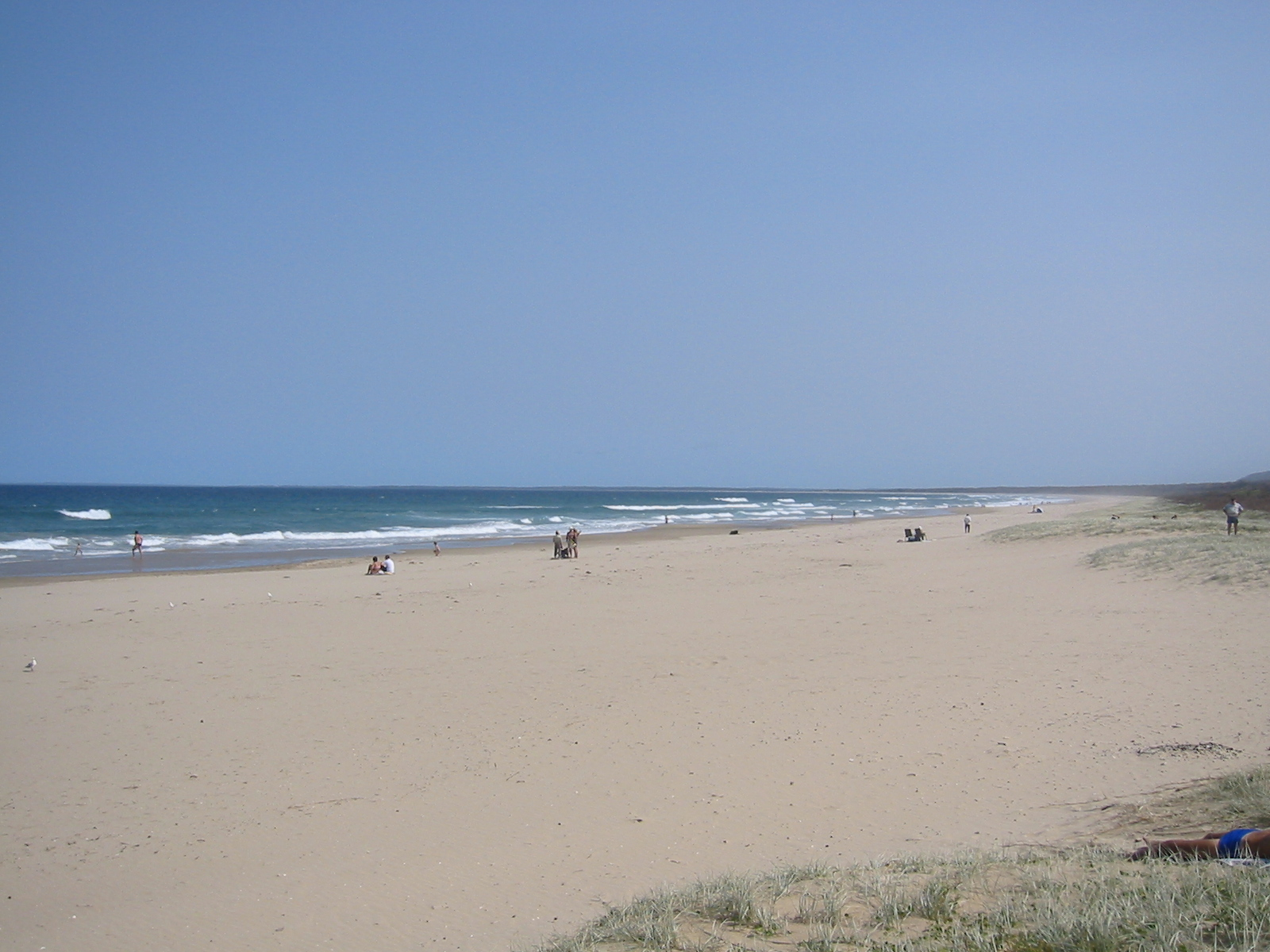 Endloser Strand in der Nähe von Nowra, NSW